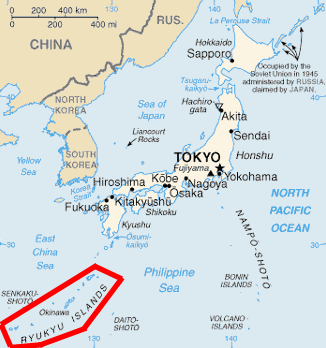 Karte Japans, Ryukyu-Inseln markiert, 60 KB